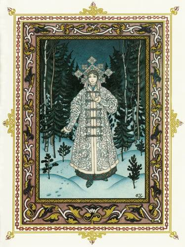 Снежная королева. Иллюстрация к книге "Жар-птица"